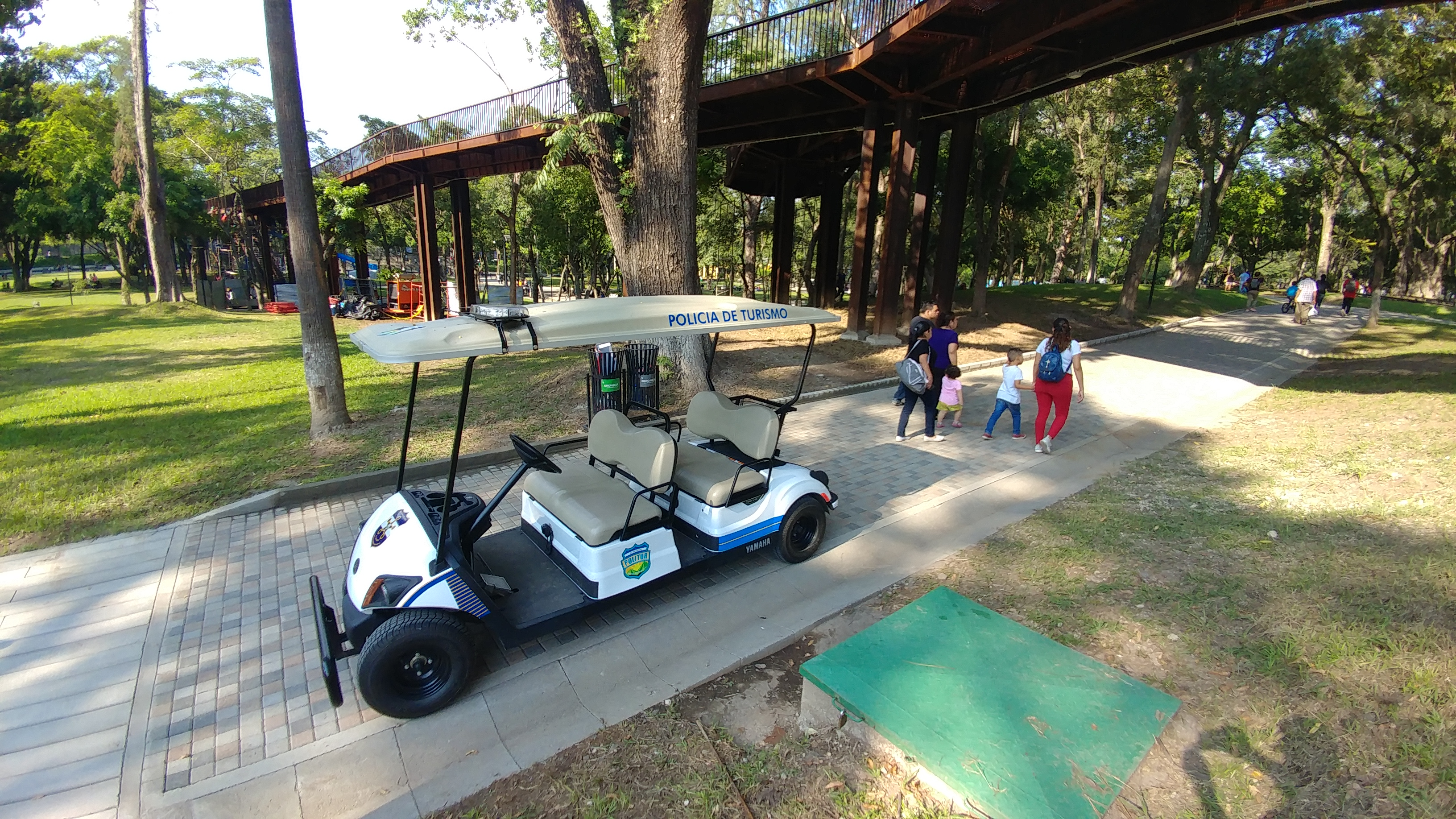 parte de la seguridad del parque cuscatlán como los del primer mundo